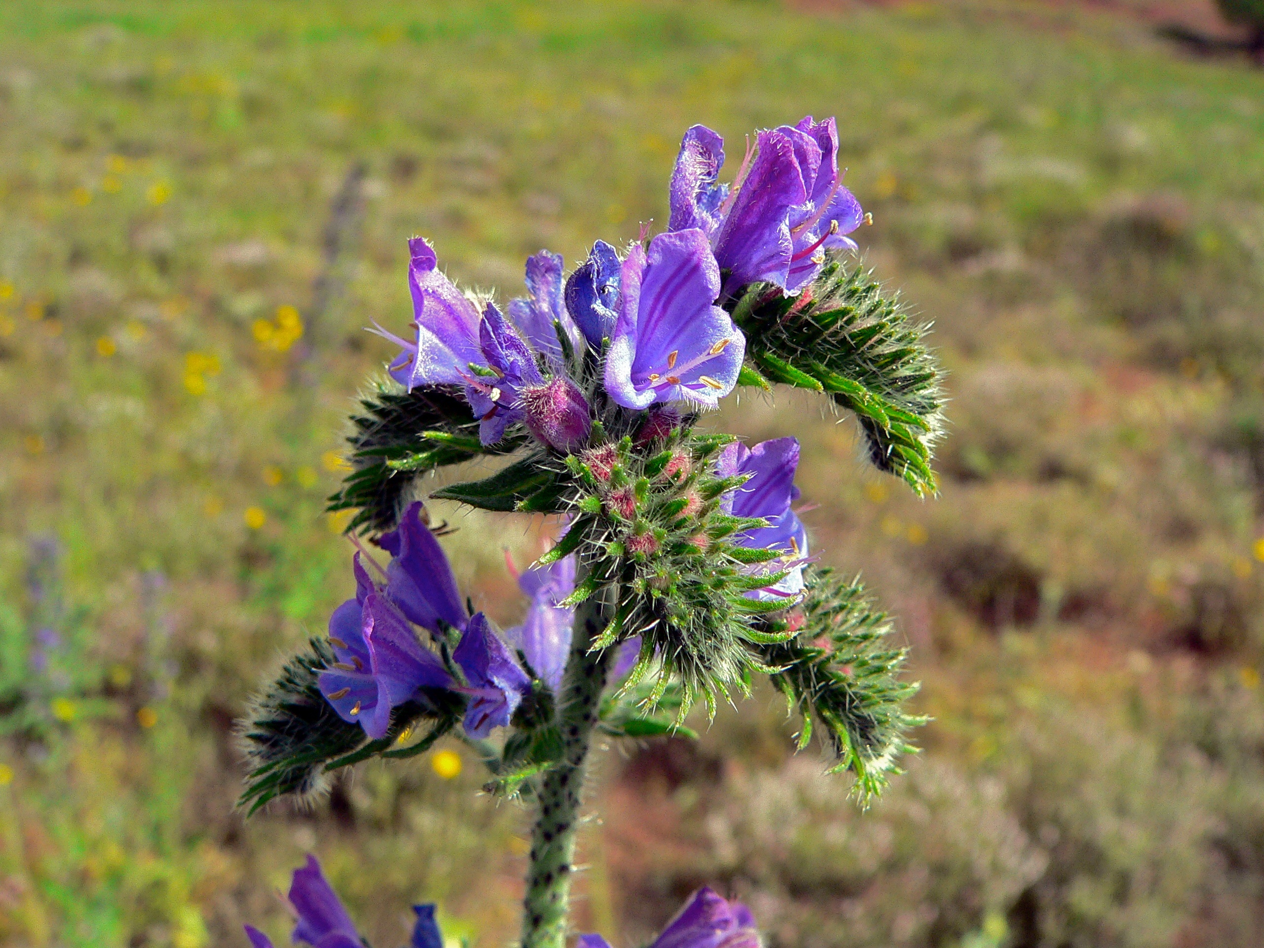 Octon, Hérault, FRANCE